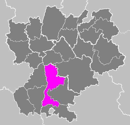 Maps of arrondissements and cantons of France: Arrondissement de Valence.PNG (Région Rhône-Alpes)